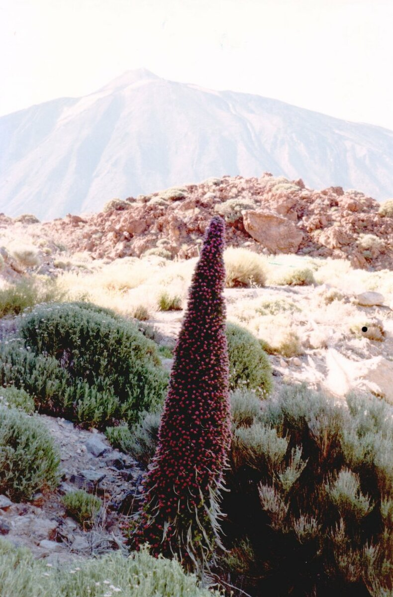 Tajinaste rojo (Echium wildpretii) con el Teide al fondo. Foto tomada en las Cañadas del Teide